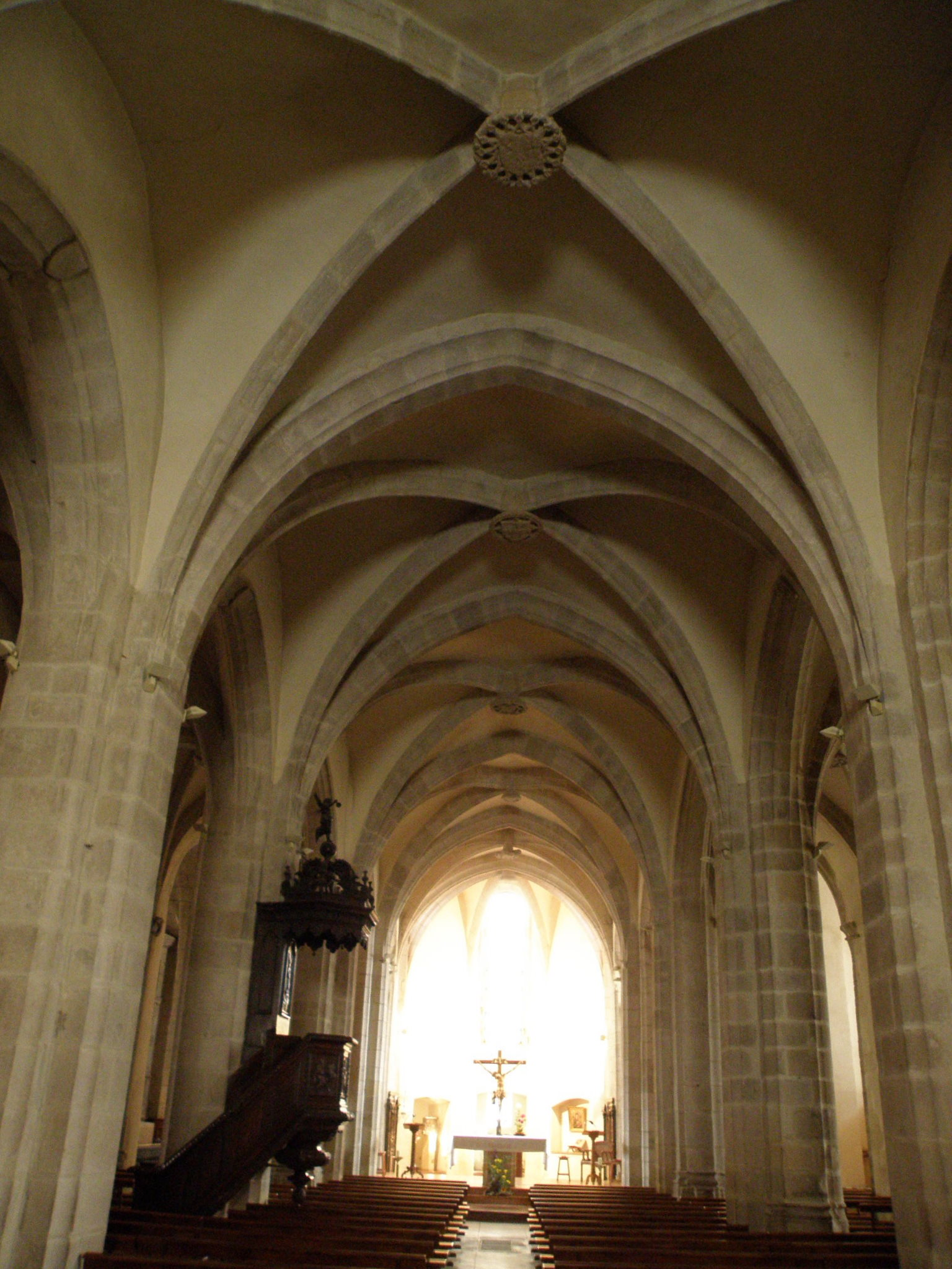 Craponne-sur-Arzon, comm. de la Haute-Loire, France (Auvergne). Église Saint-Caprais, nef gothique. La chaire (à gauche) a été créée en 1735 par le sculpteur Gabriel Samuel. Remarquer les clefs de voûte armoriées.